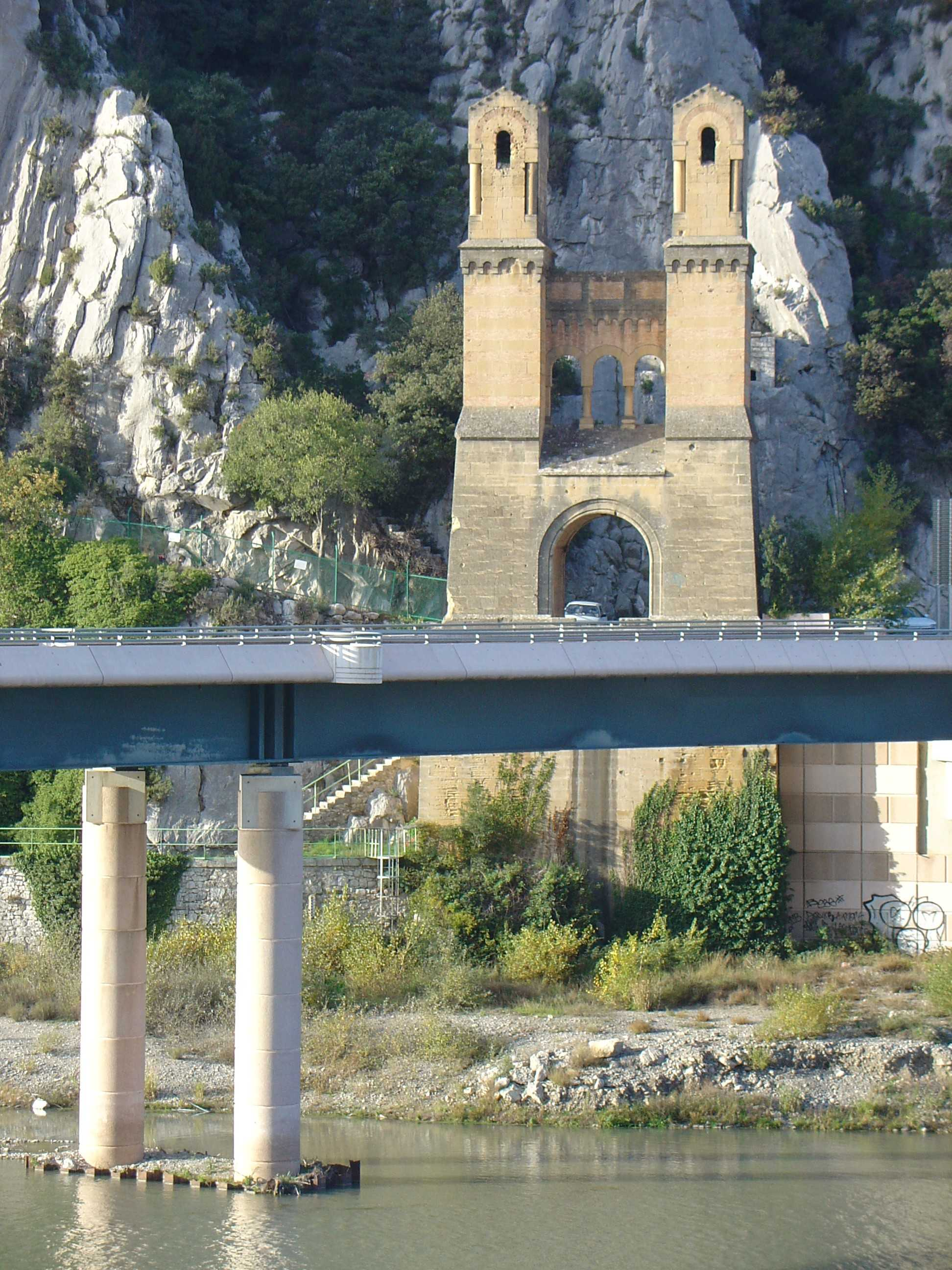 Le pont de Mirabeau (Vaucluse) avec les vestiges de l'ancien pont